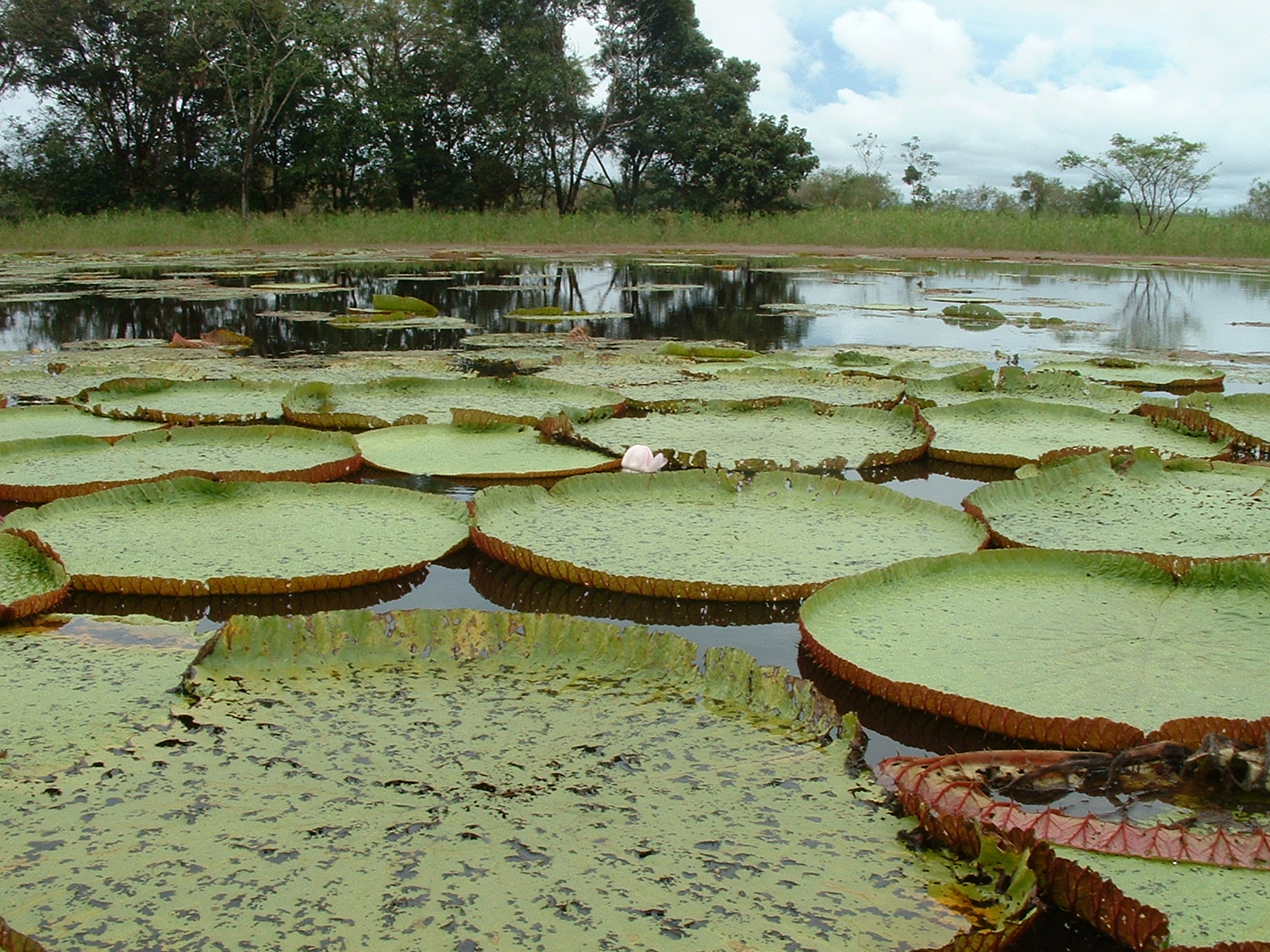 vitória régia